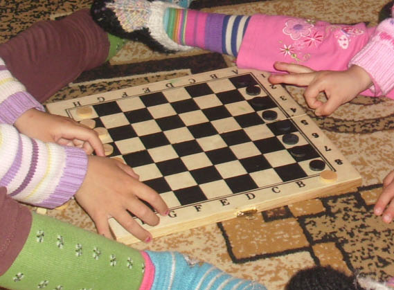 Дети играют в Чапаева